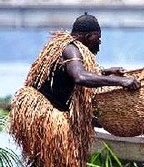 Messager chez les Douala portant dans ce panier les prescriptions des ancêtres durant la cérémonie de "Ngodo"